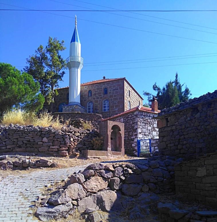 karahüseyinli köy camisi ve köy çeşmesi